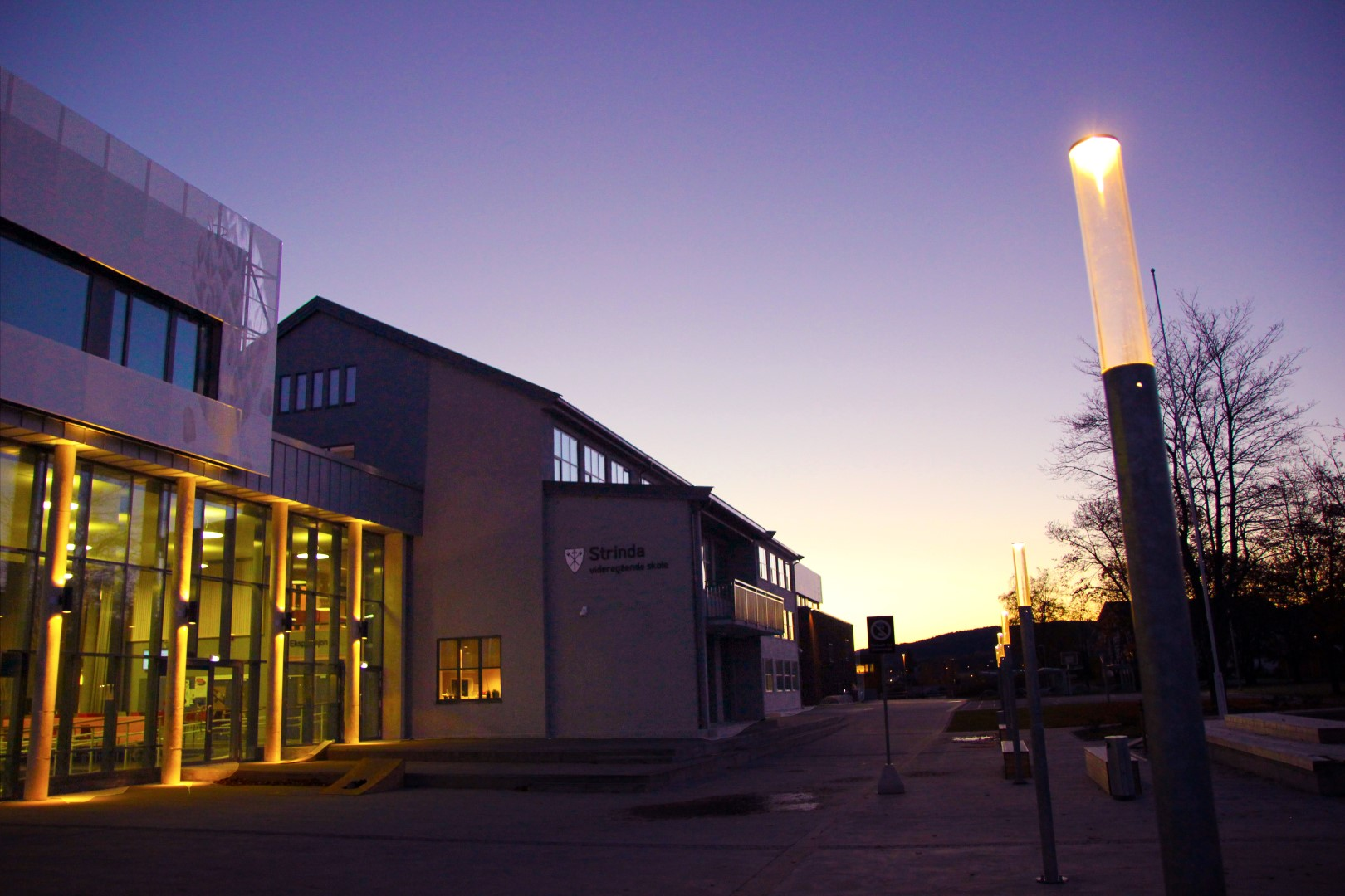 Strinda vgs